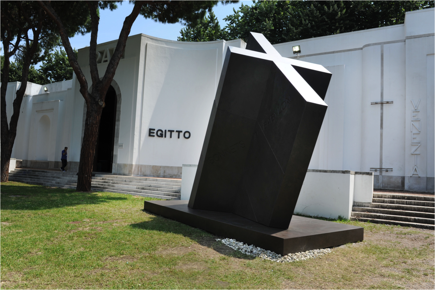 Imágenes Sonnets in Babylon. Jardín de la Bienal de Venecia- Italia